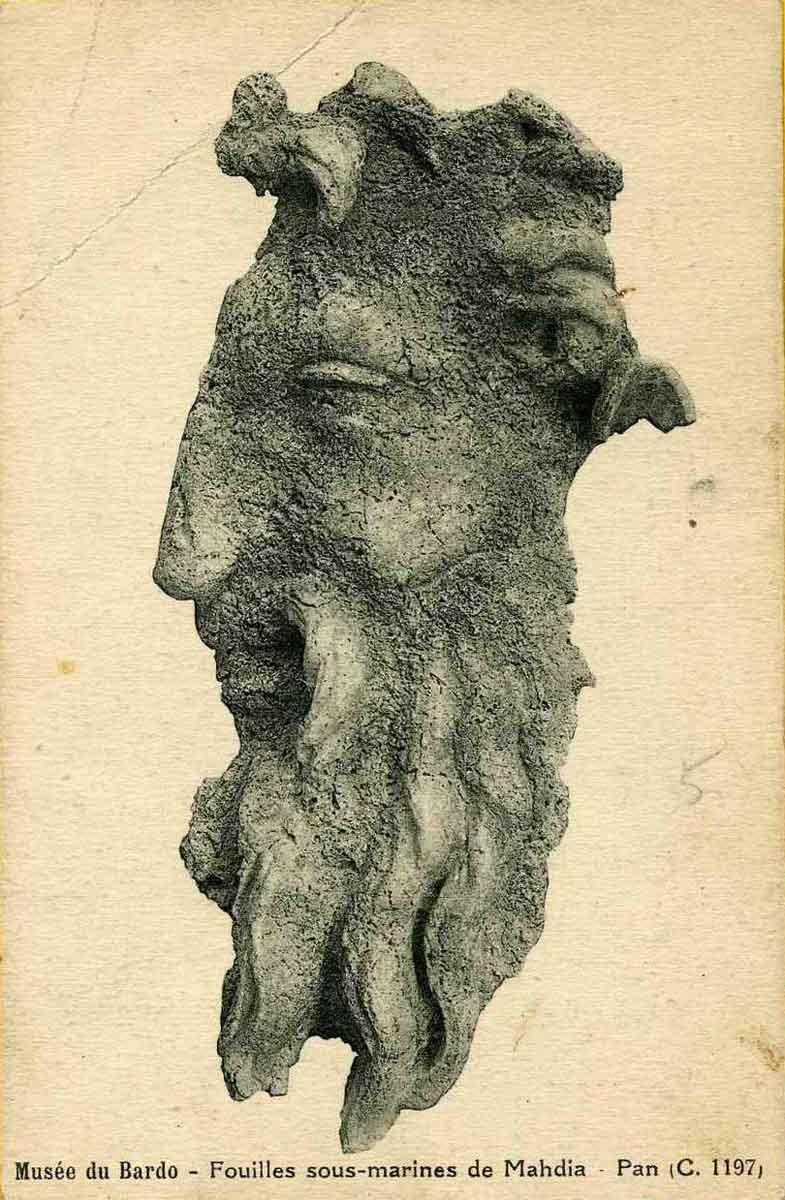 Pan, fouilles de Mahdia